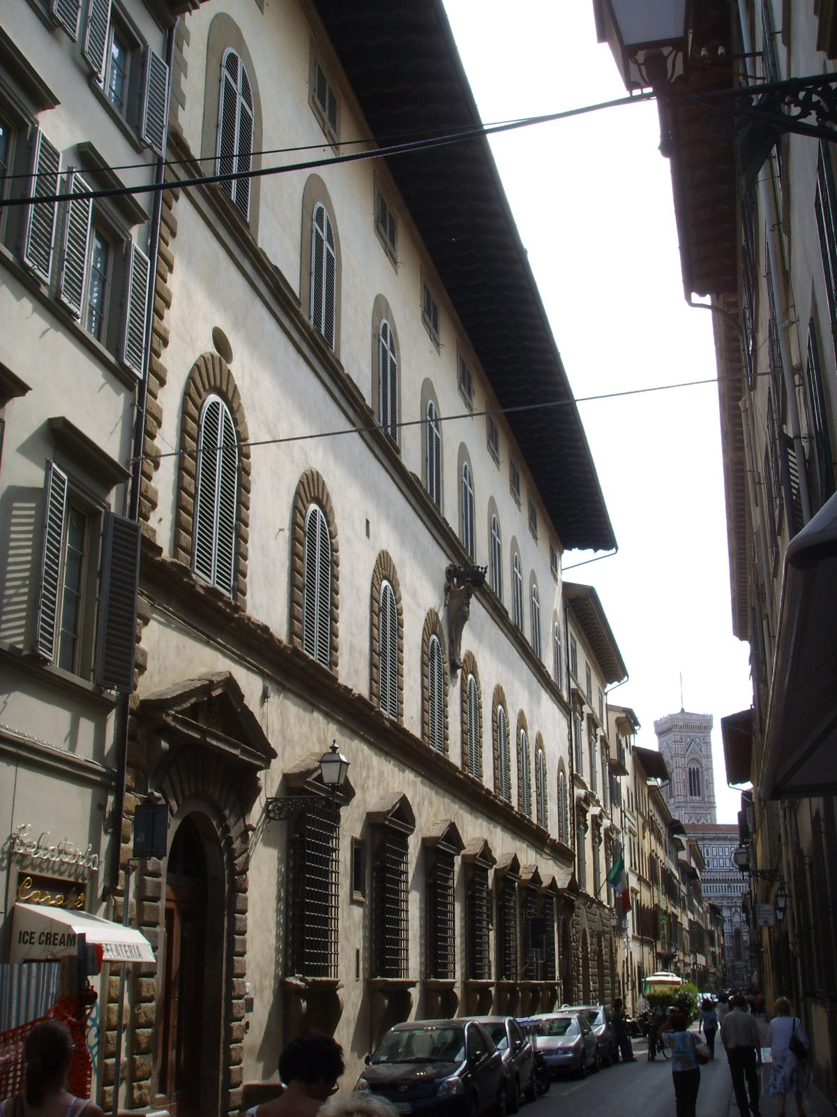 Palazzo gerini